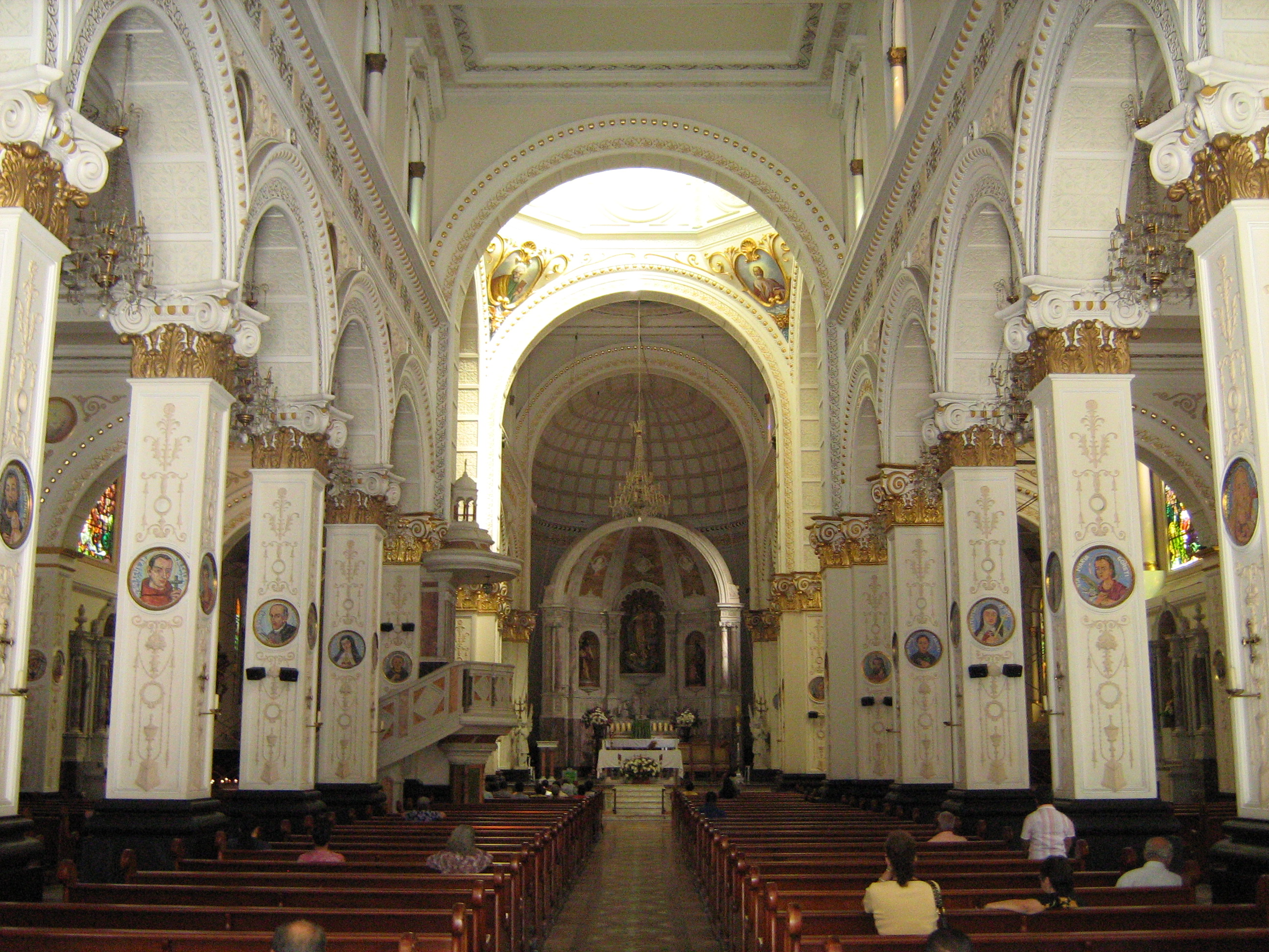 Iglesia de Nuestra Señora del Rosario en el municipio de Bello, Colombia.